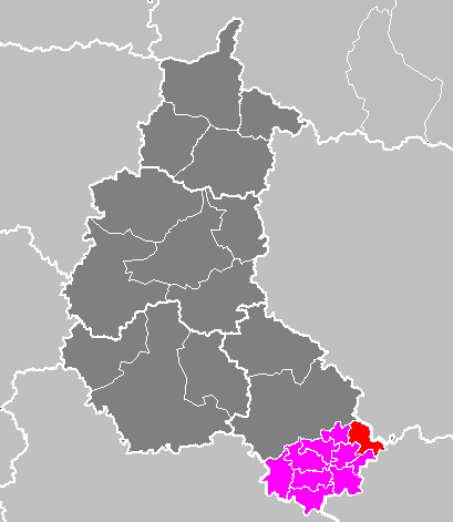 Maps of arrondissements and cantons of France: Arrondissement de Langres - Canton de Bourbonne-les-Bains.PNG